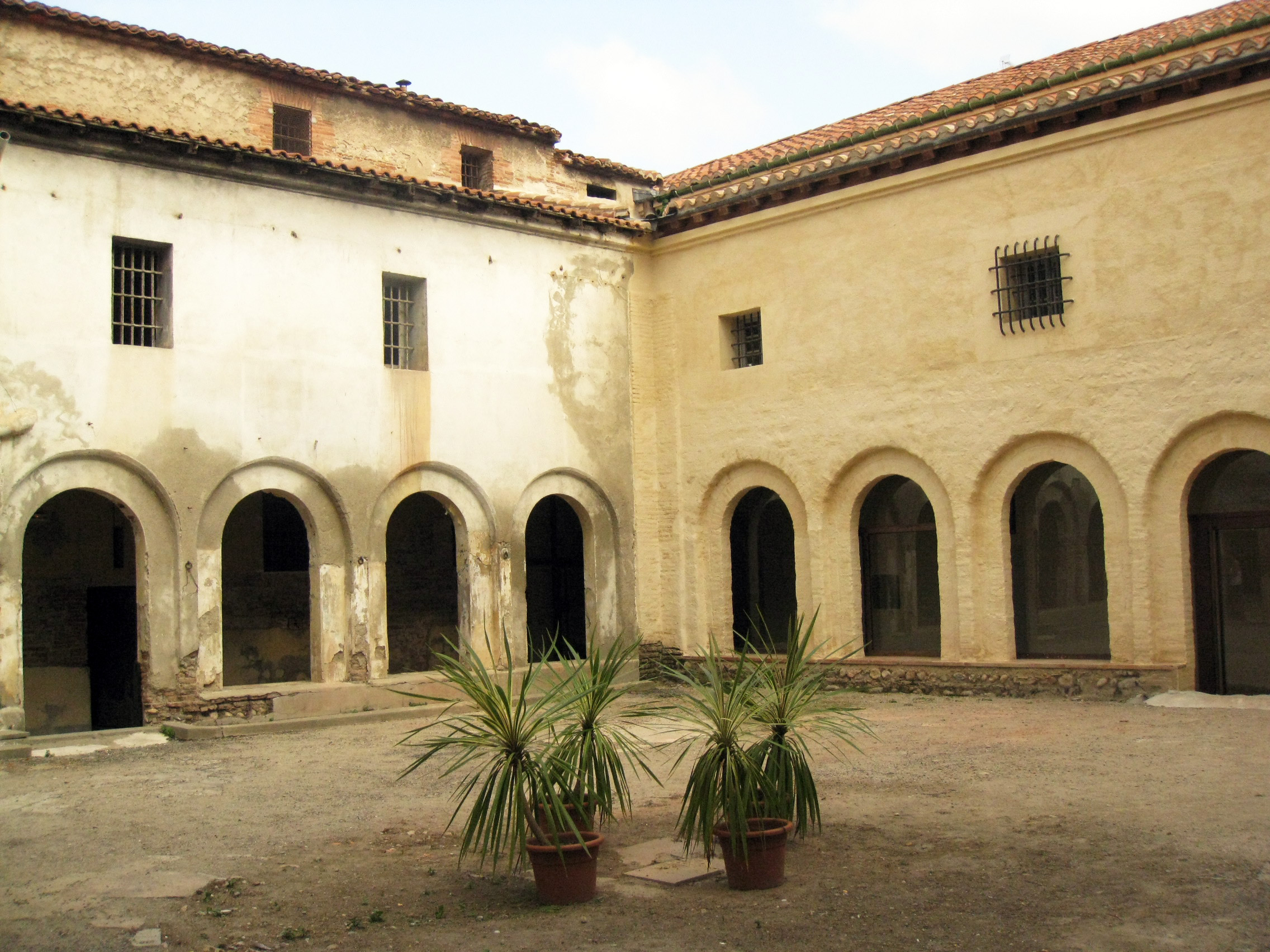 Convent de Santa Clara (Perpinyà), detall del claustre .